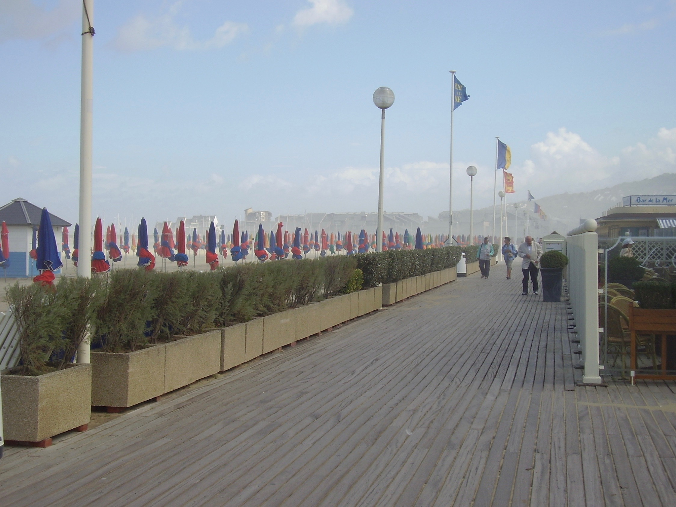 Deauville, Frankreich